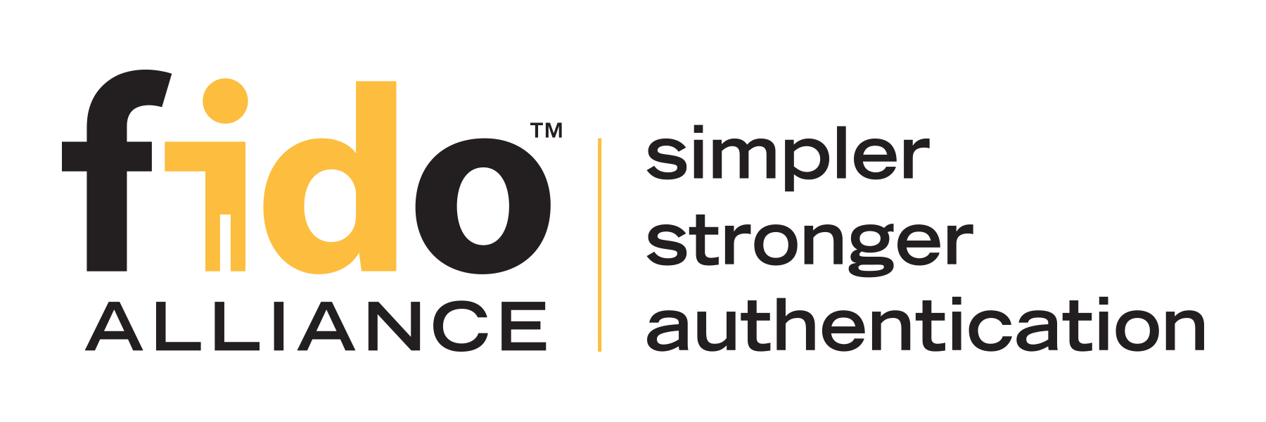 הלוגו של ארגון FIDO